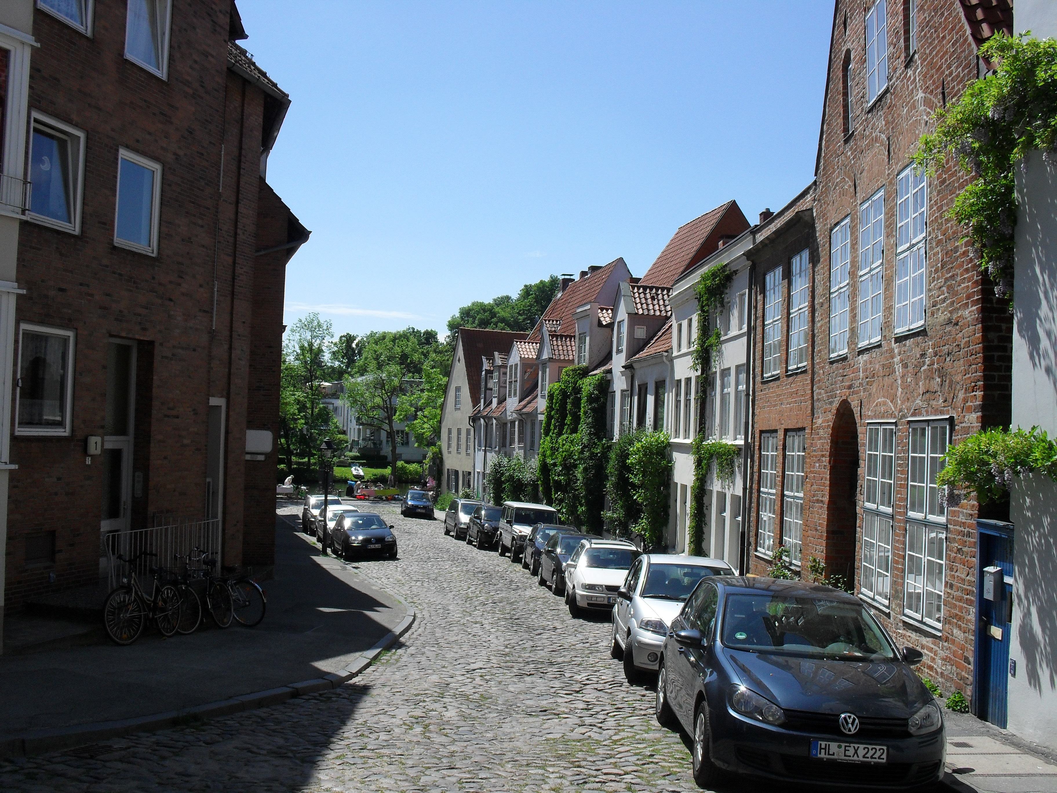 Die Effengrube in Lübeck